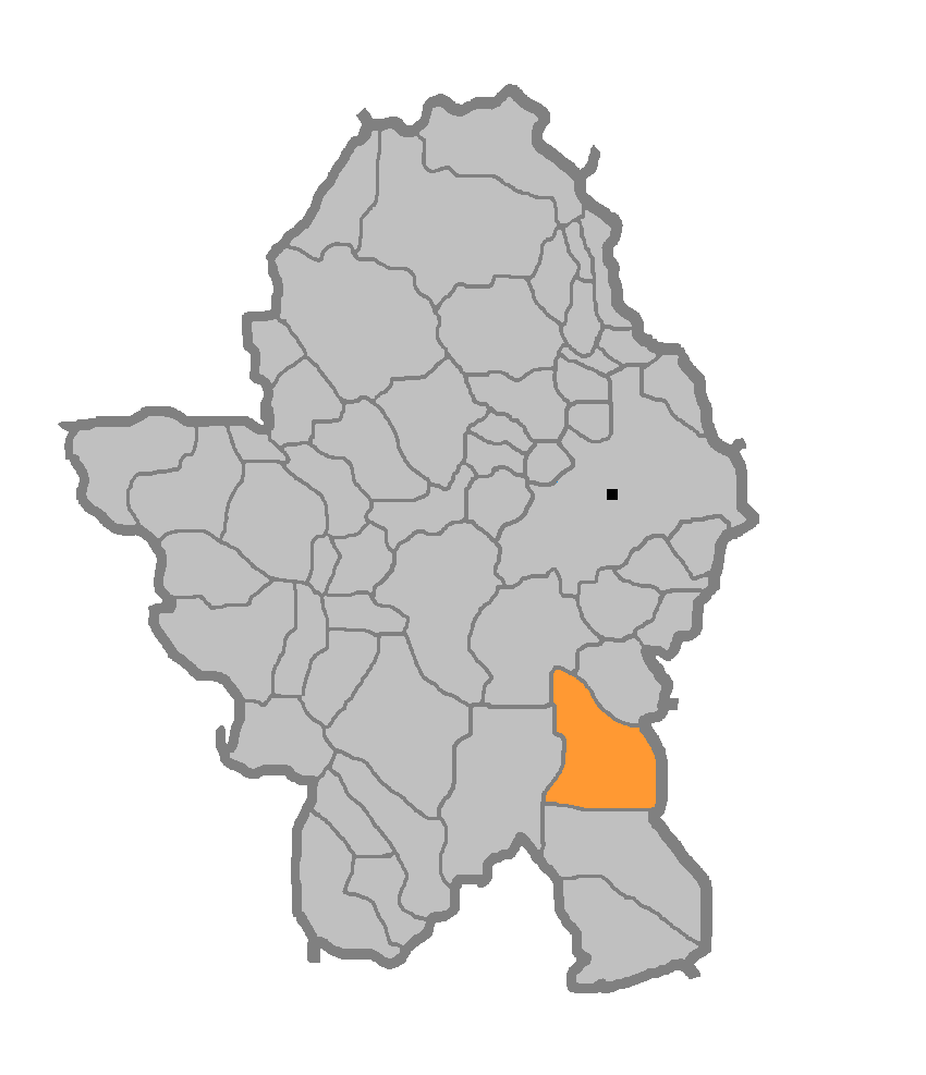 Мјесна заједница Крмине